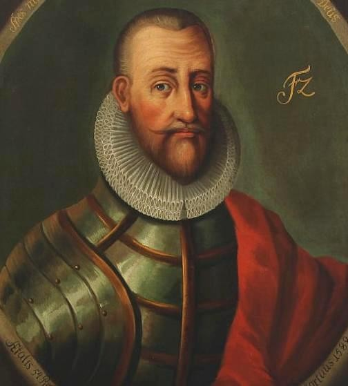 Frederik II. King of Denmark